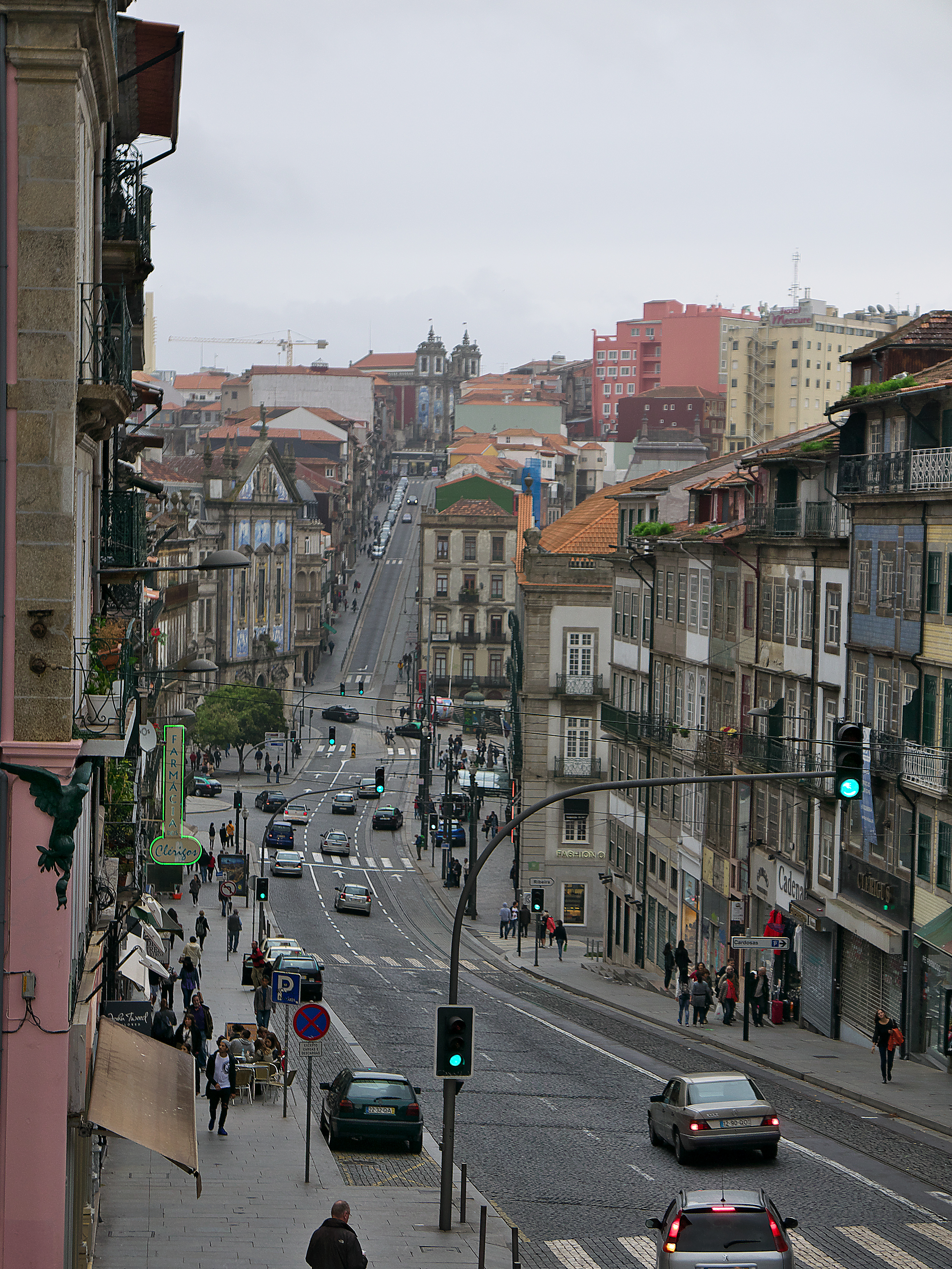 Entre la Plaza de la Libertad y la Calle de las Carmelitas.